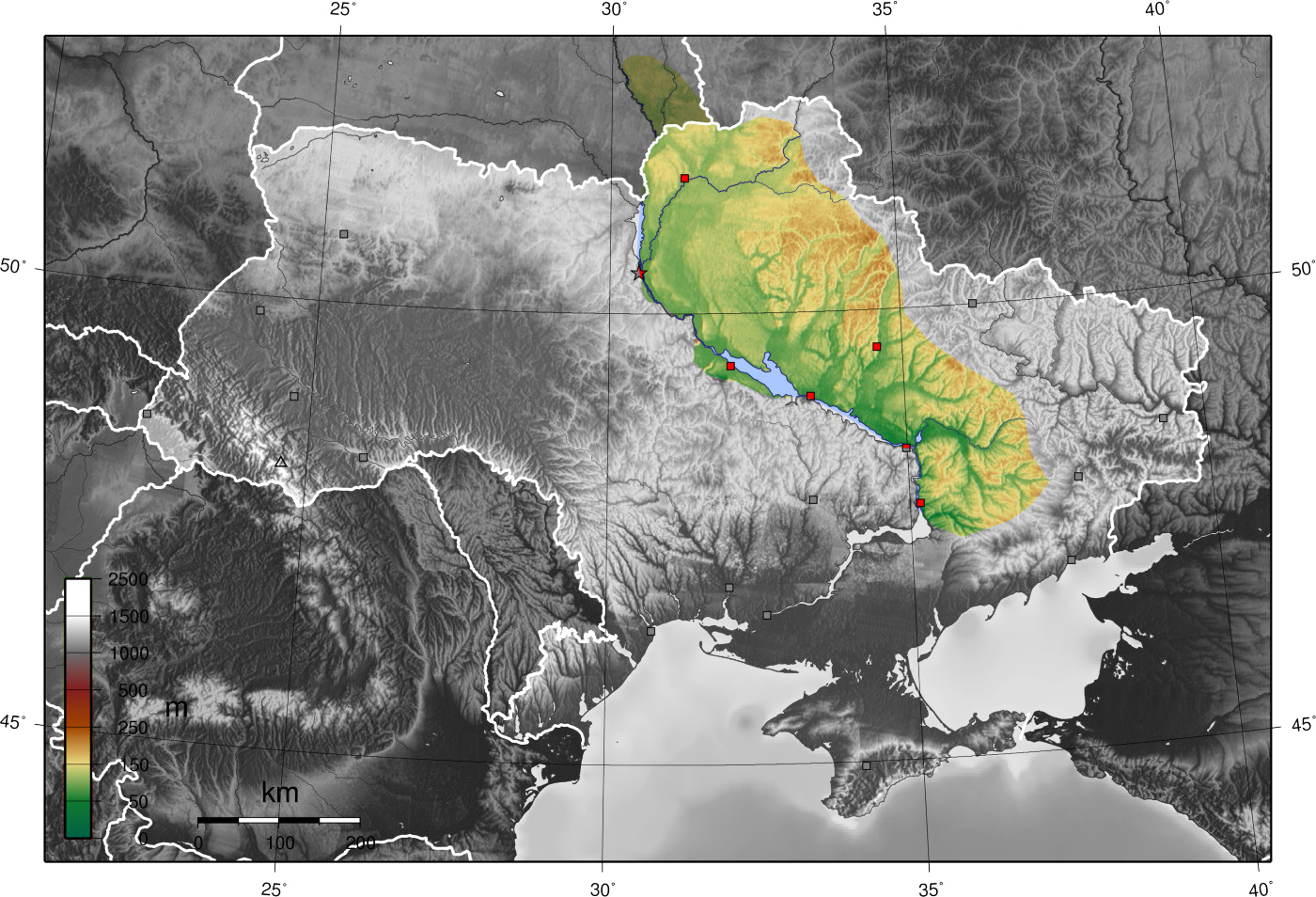 Piedņepras zemienes novitojums Ukrainas kartē